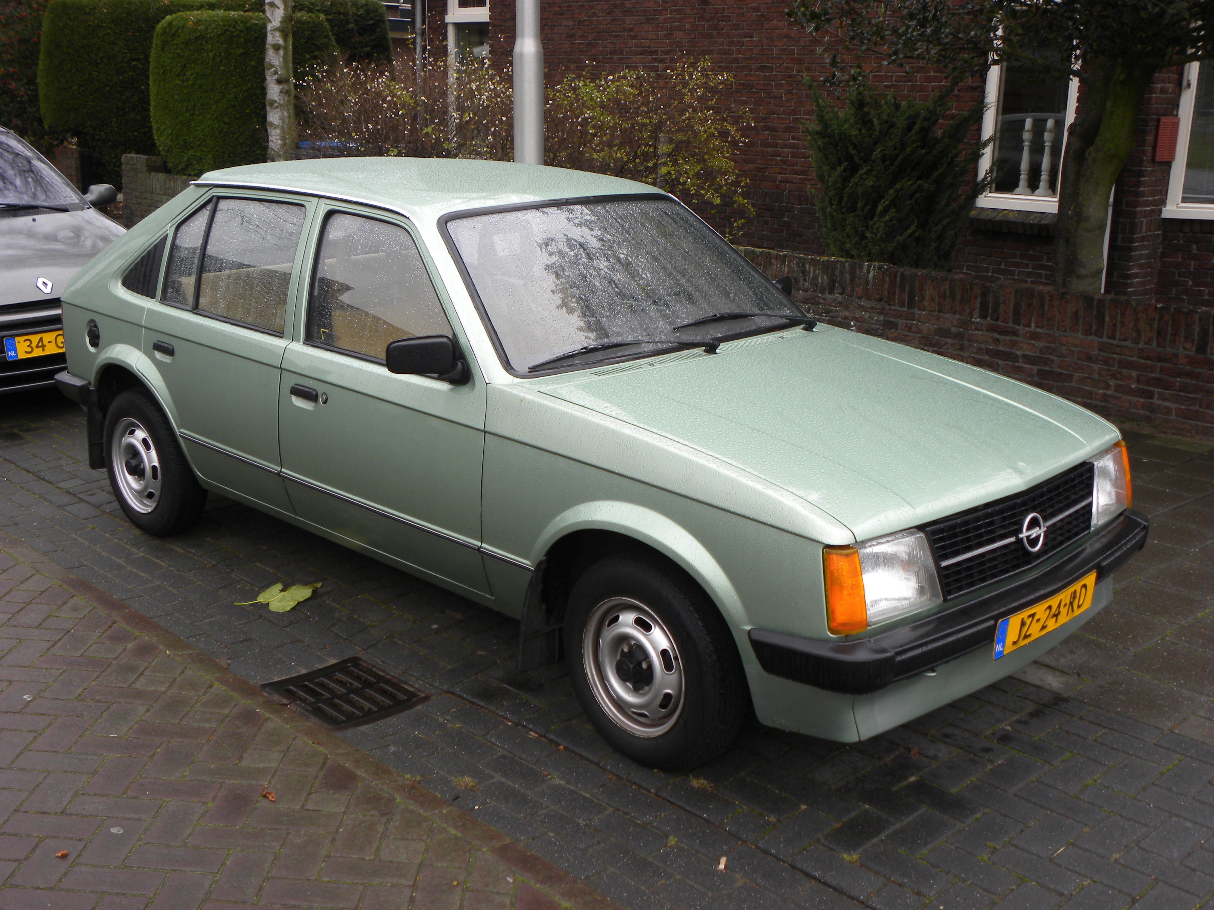 Opel Kadett D 1,3 S